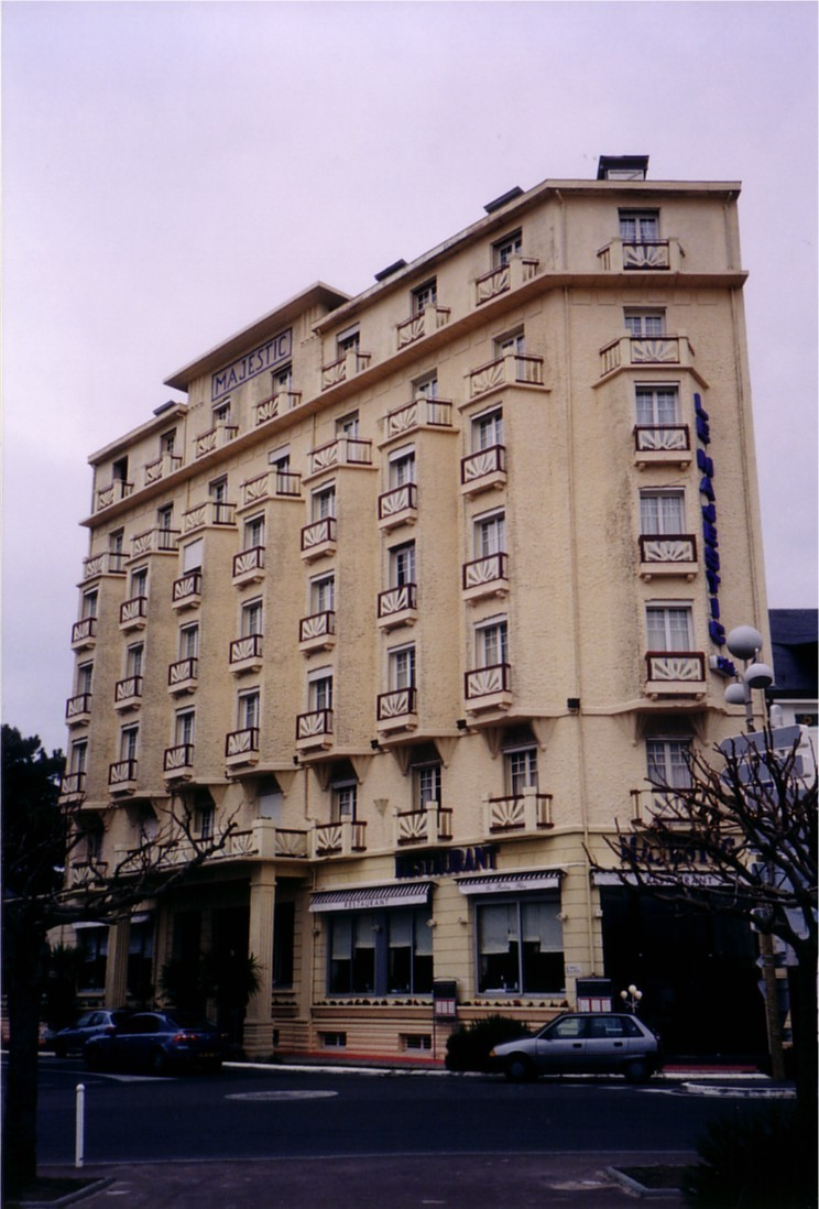 Hotel "Majestic" in La Baule.